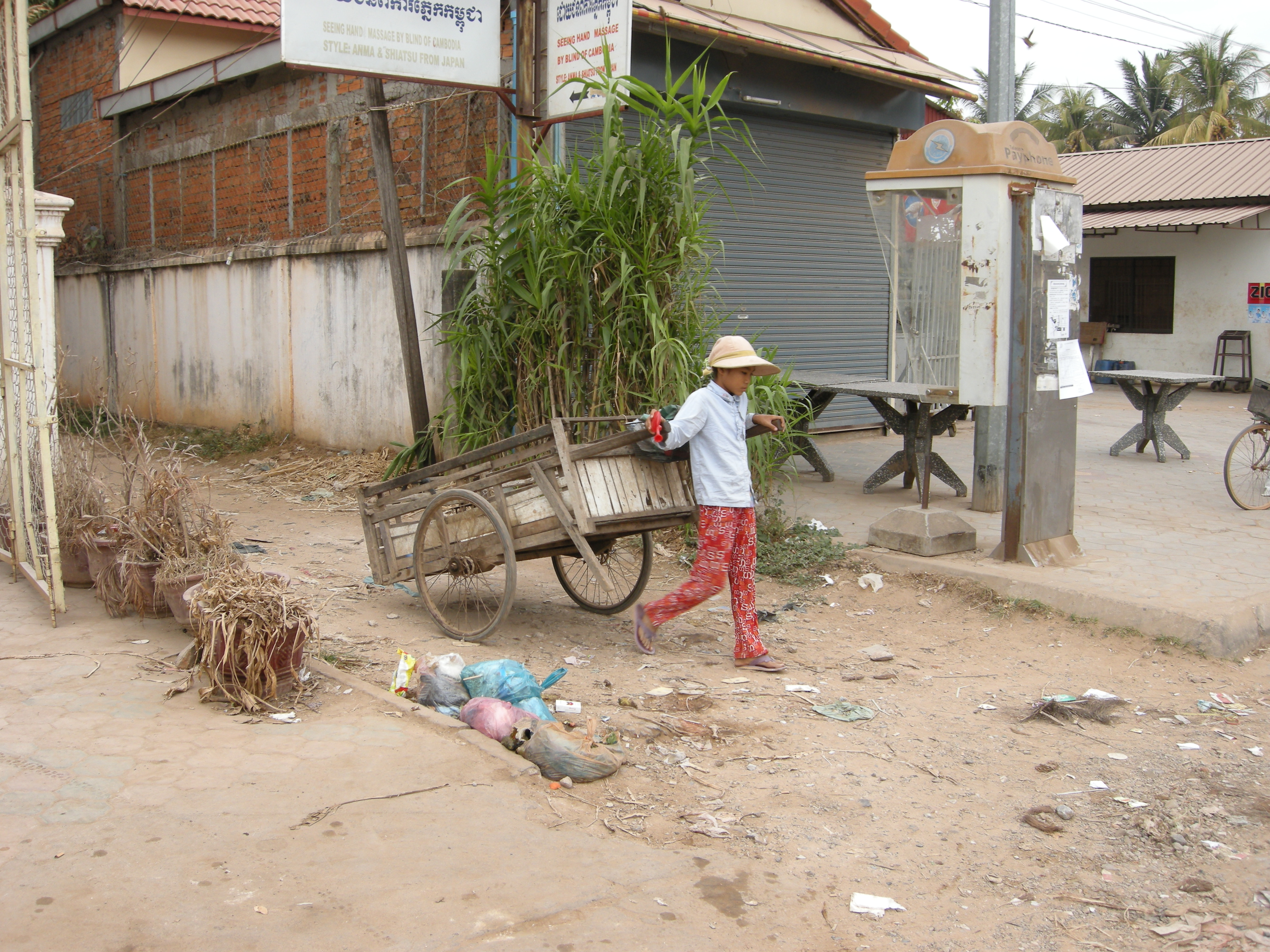 Siem Reap, Cambodia